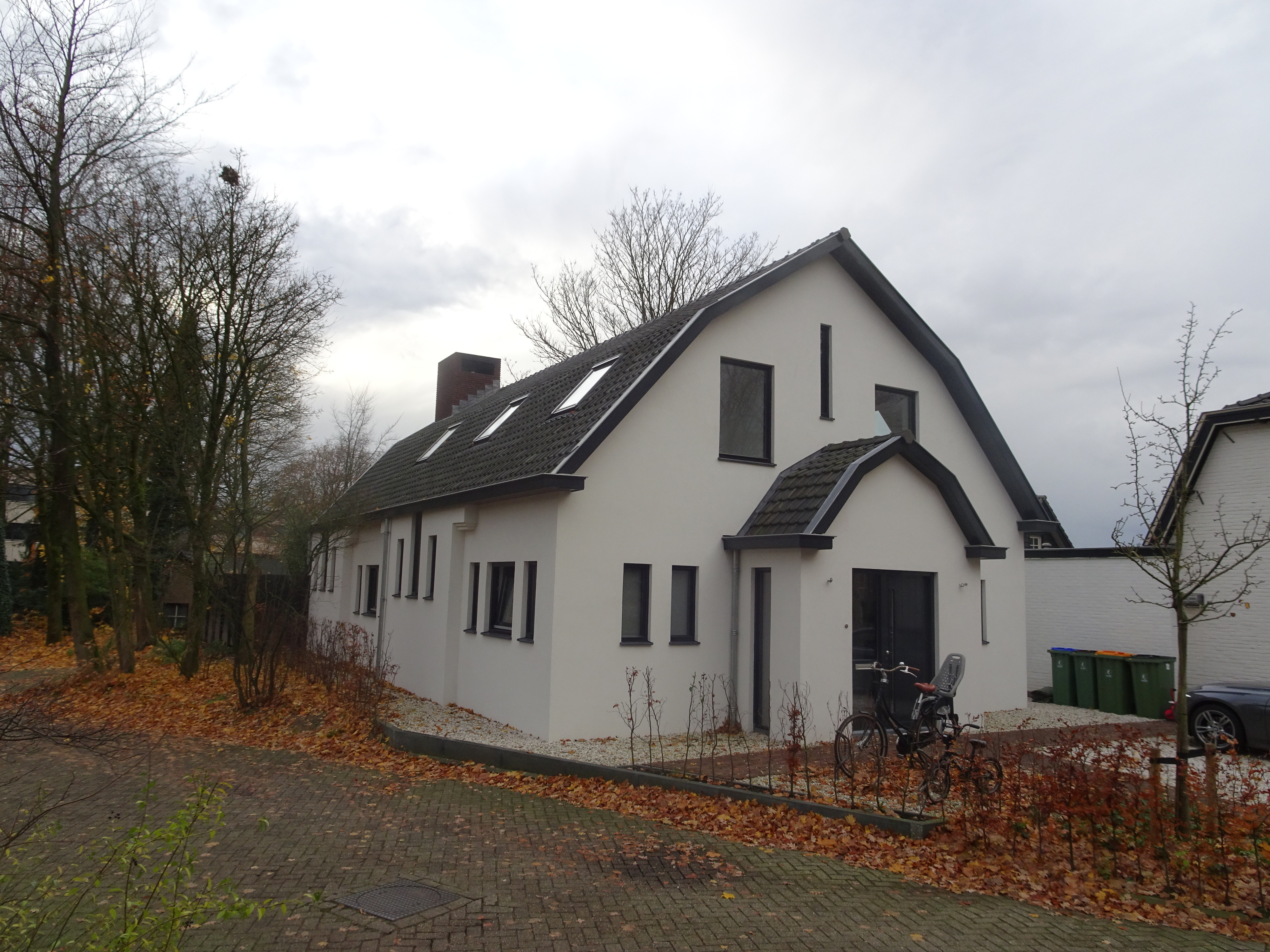 Voormalige ChristelijkeGereformeerde Kerk in Ede uit 1925, later moskee